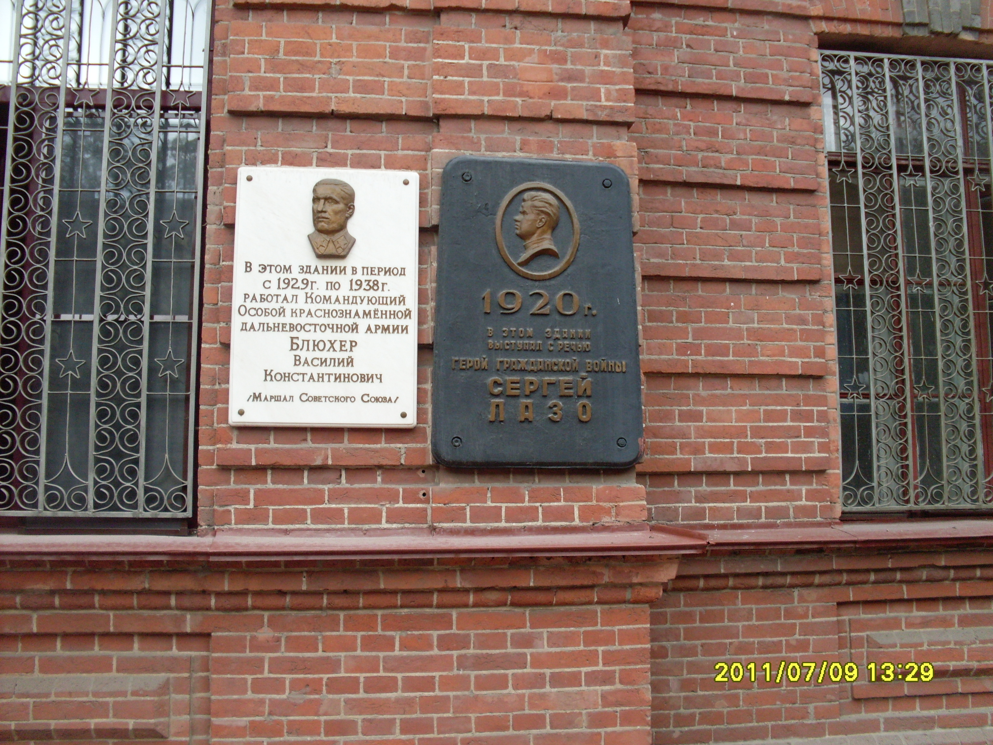 Памятная доска в честь В.К.Блюхера на здании штаба Восточного военного округа в Хабаровске